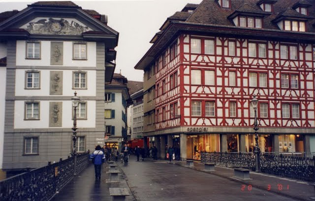 Люцерн. Типичные исторические здания